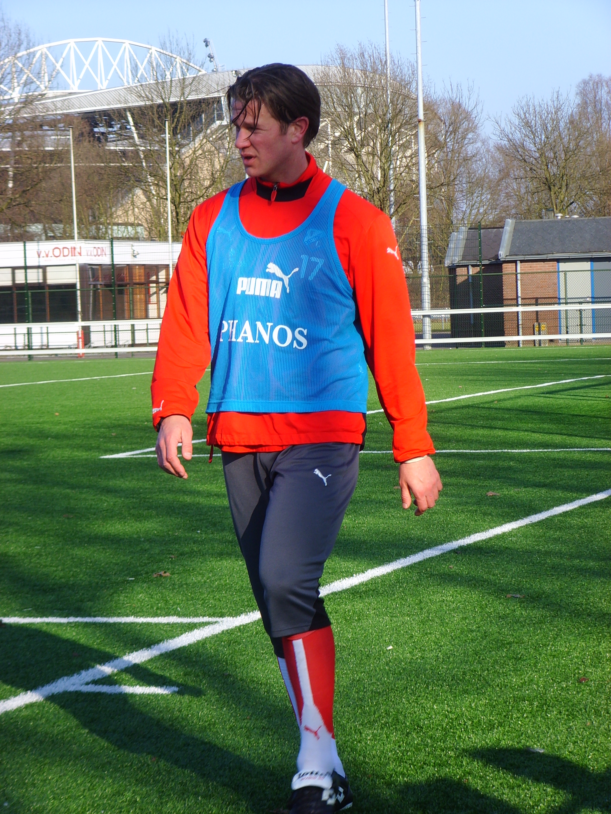 Voetballer Alje Schut tijdens een training van FC Utrecht - OpenStreetMap (Info)